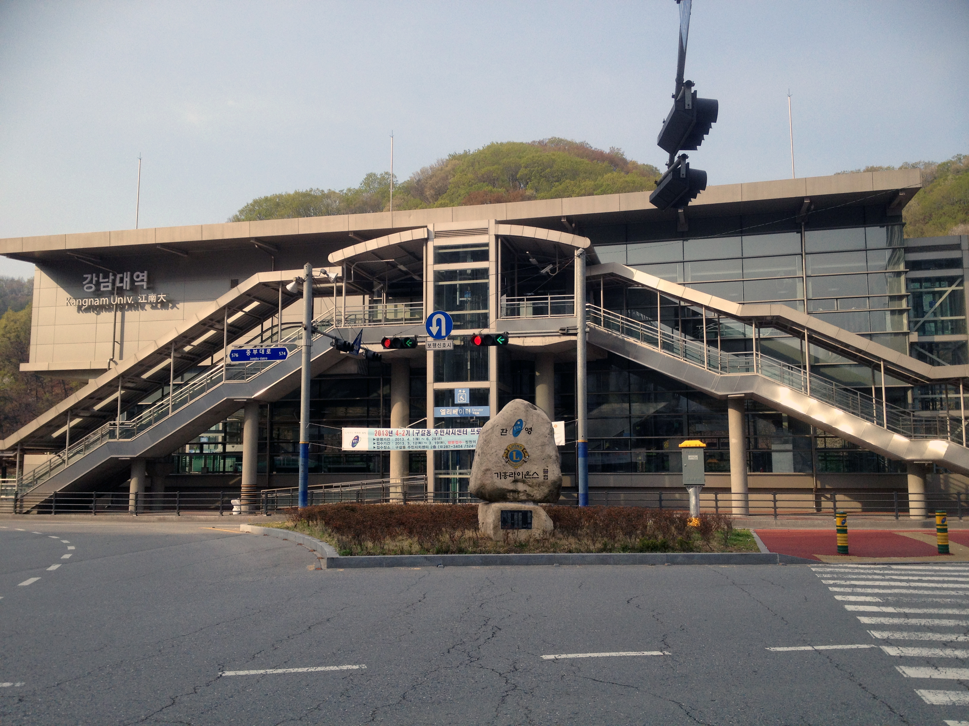 강남대역 역사